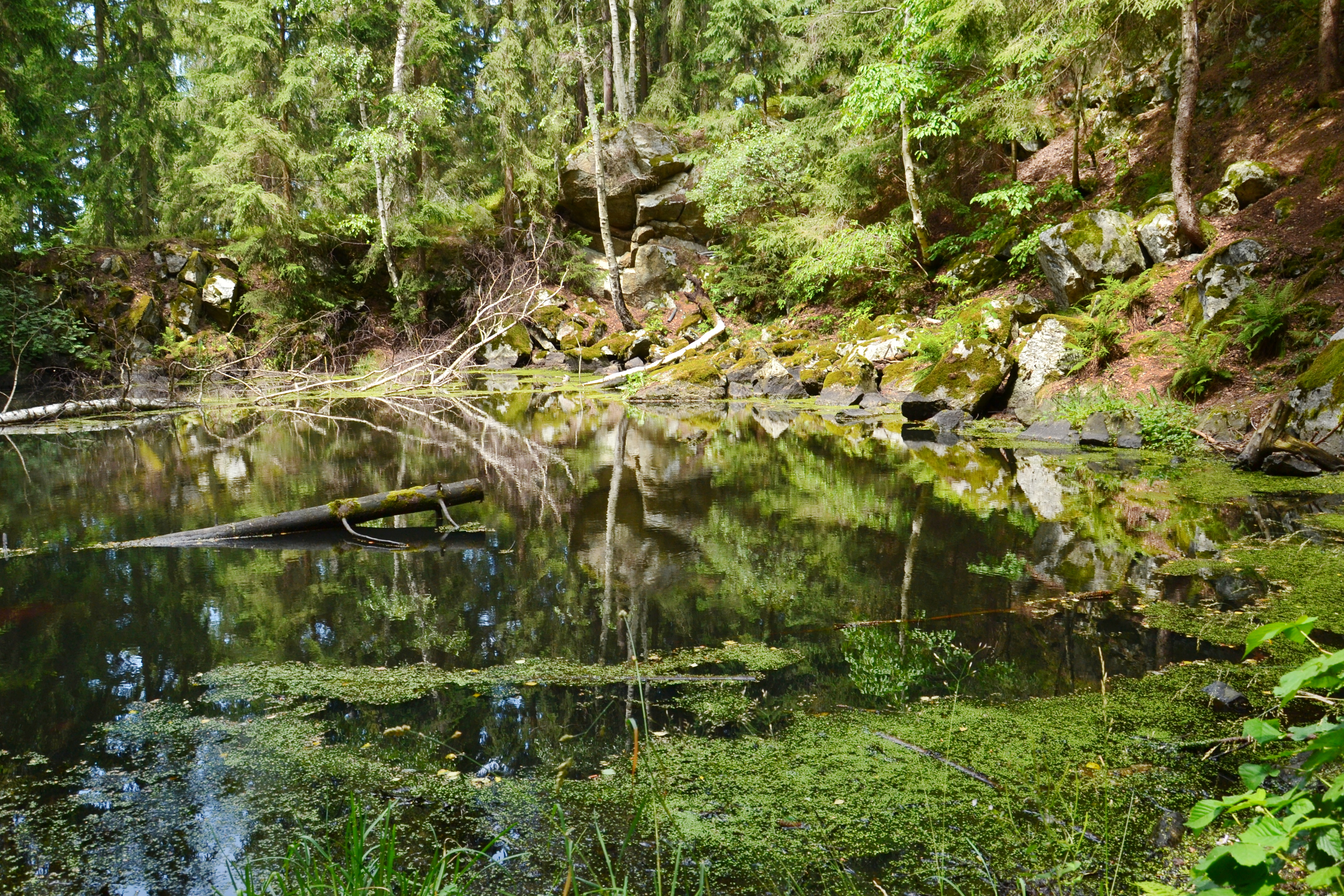 Jezírko ve starém lomu